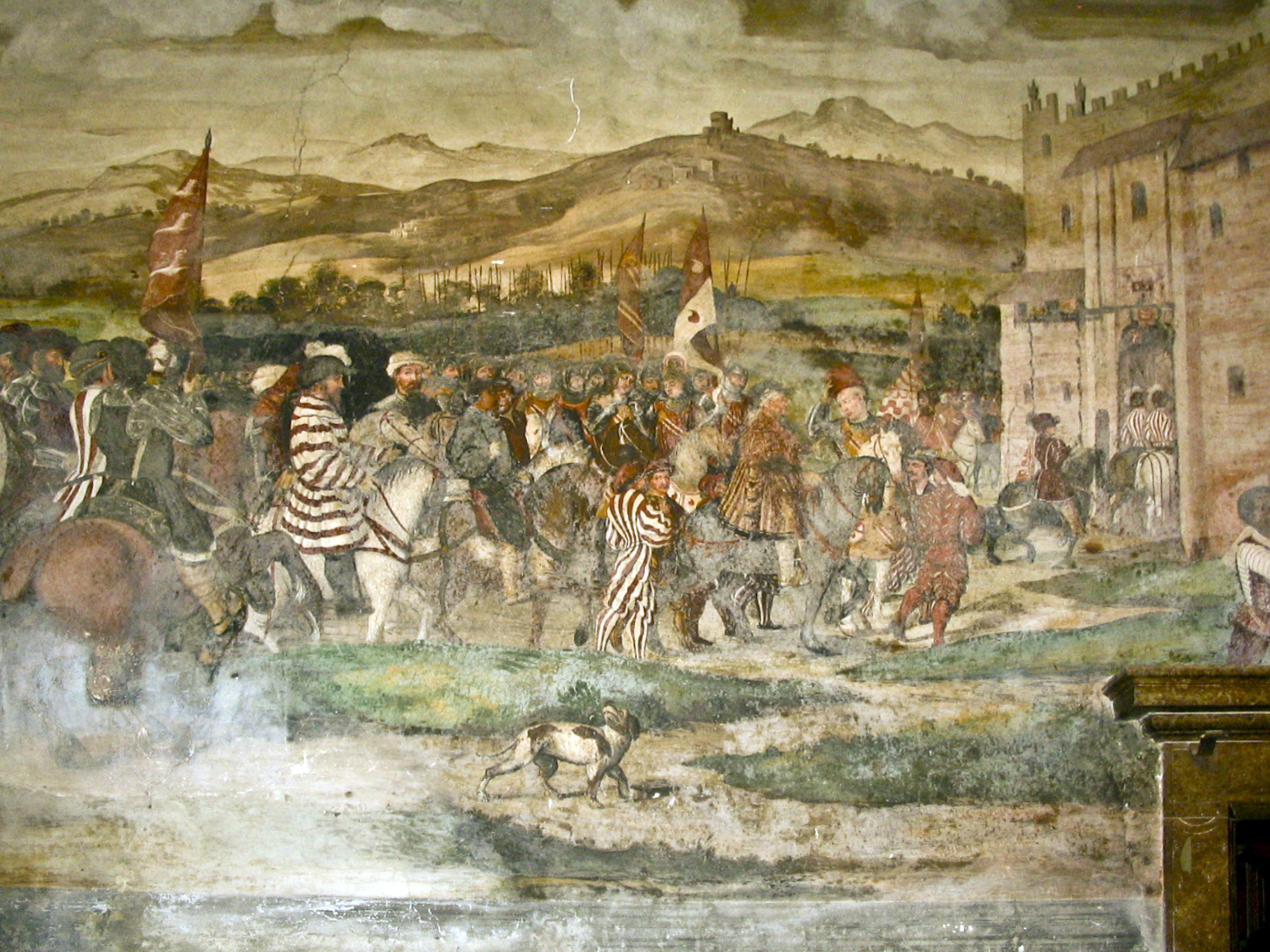 Affreschi del Castello di Malpaga, di Bartolomeo Colleoni. Cristiano I di Danimarca visita il Colleoni. Opera attribuita al Romanino (1467). Foto di Giorces.